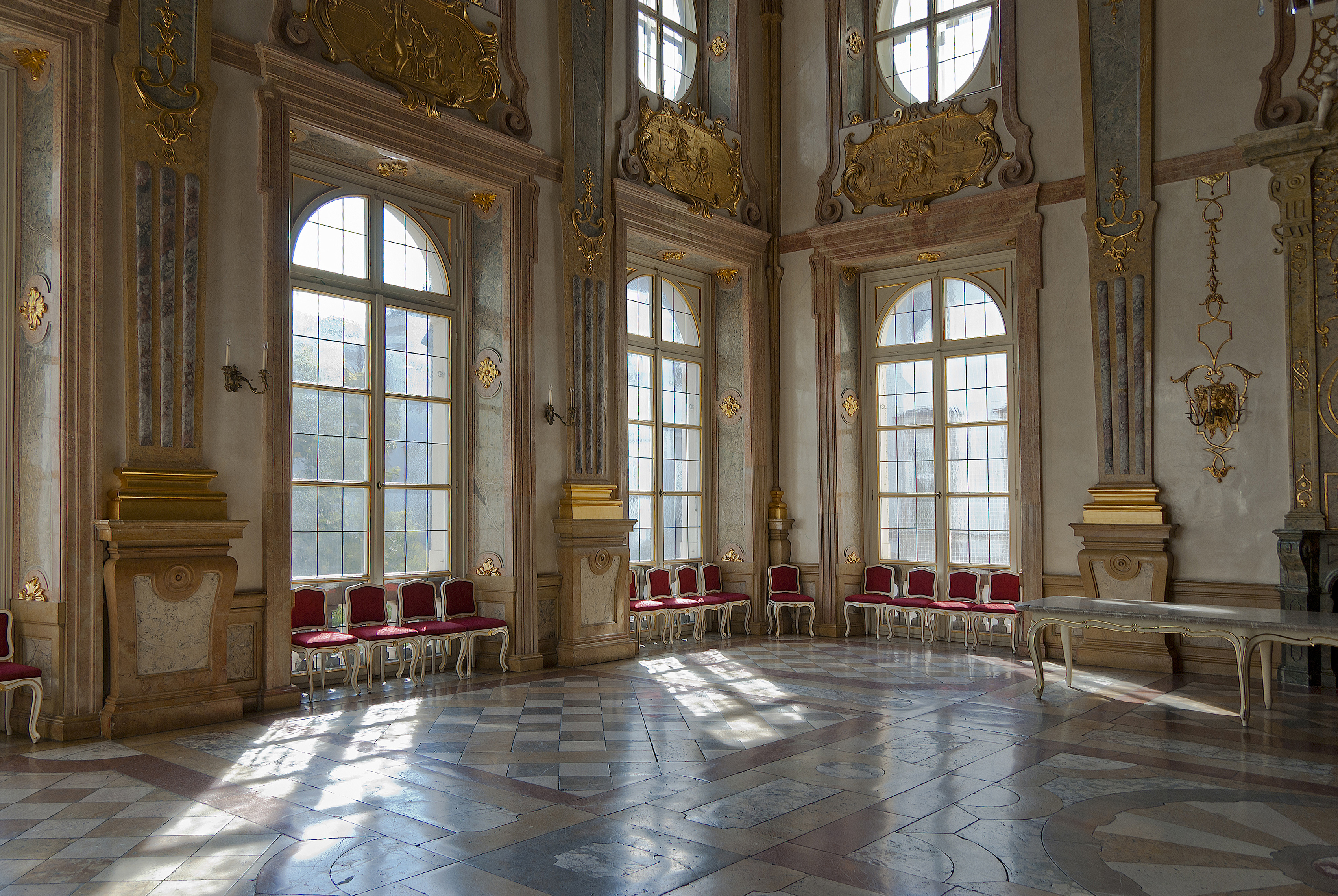 Schloss Mirabell: Marmorstiege und Marmorsaal Dieses Bild wurde anlässlich des österreichischen Tags des Denkmals 2013 in Salzburg eingereicht.